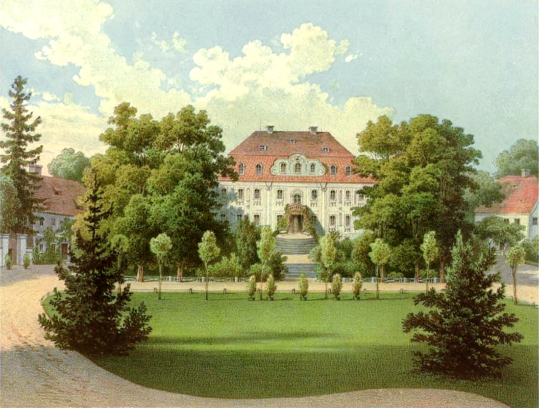 Rittergut Armenruh, Kreis Goldberg-Hainau, Provinz Schlesien